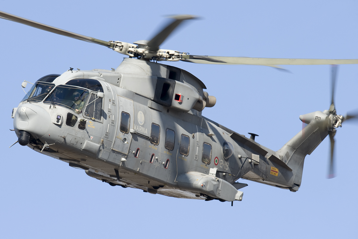 Marina Militare